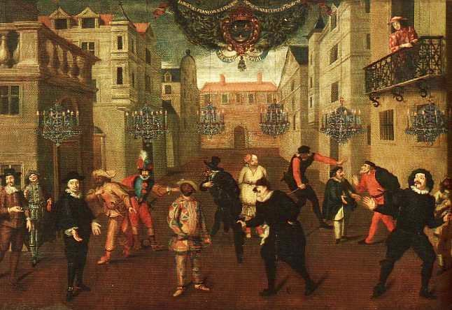 Een stuk van Moliere. De maker is onbekend.